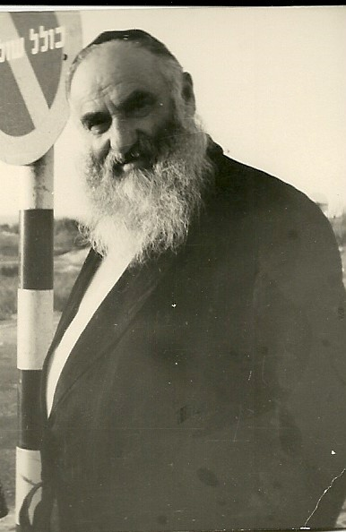 אברהם זאב טרגר